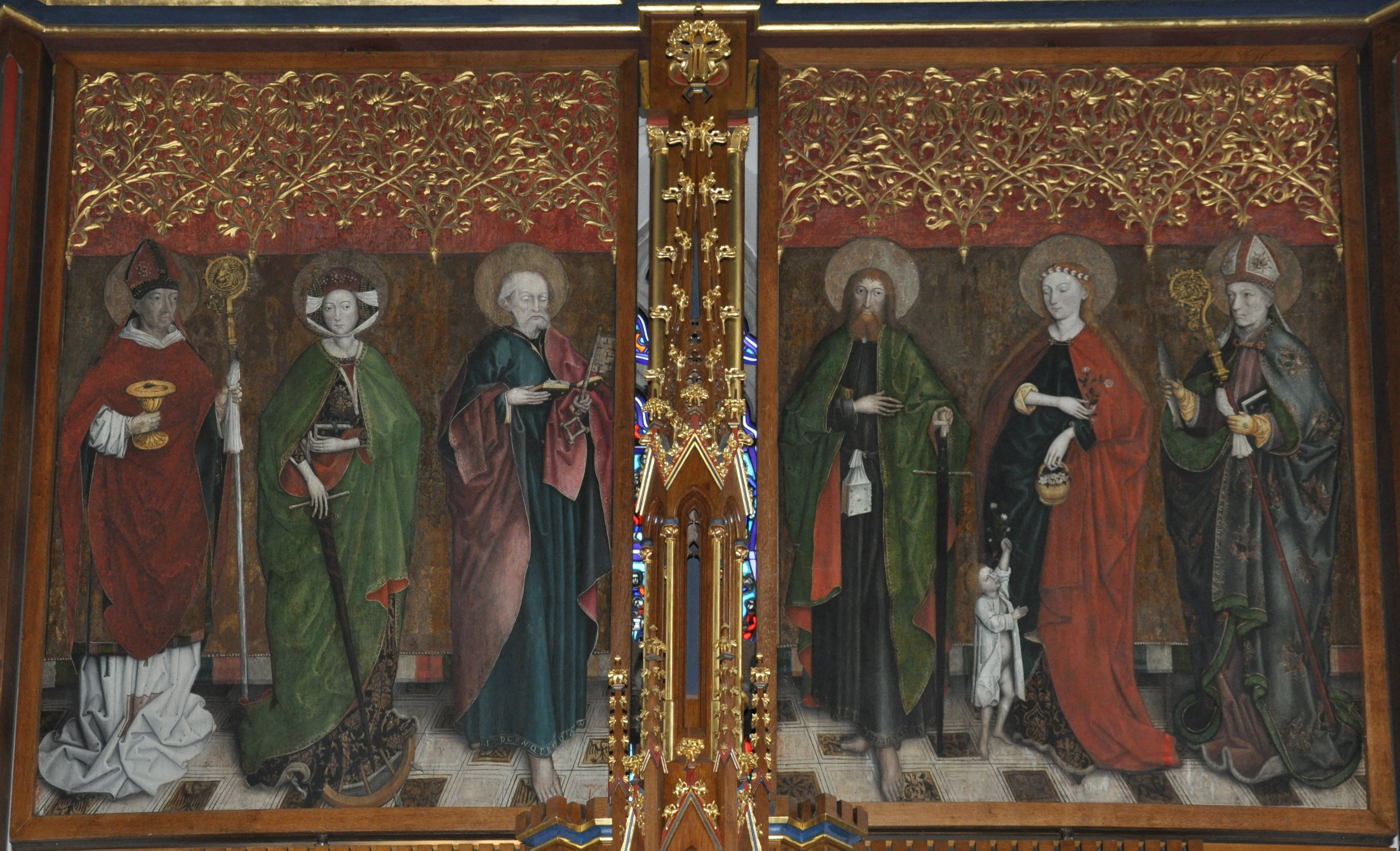 Oberstadion (Alb-Donau-Kreis), Pfarrkirche St. Martinus, Hauptaltar, Gemälde (ehemals Innenseite der Flügel; 15. Jh.): Heilige Hl. Konrad von Konstanz Hl. Katharina von Alexandrien Hl. Petrus Hl. Paulus Hl. Dorothea Hl. Ulrich von Augsburg